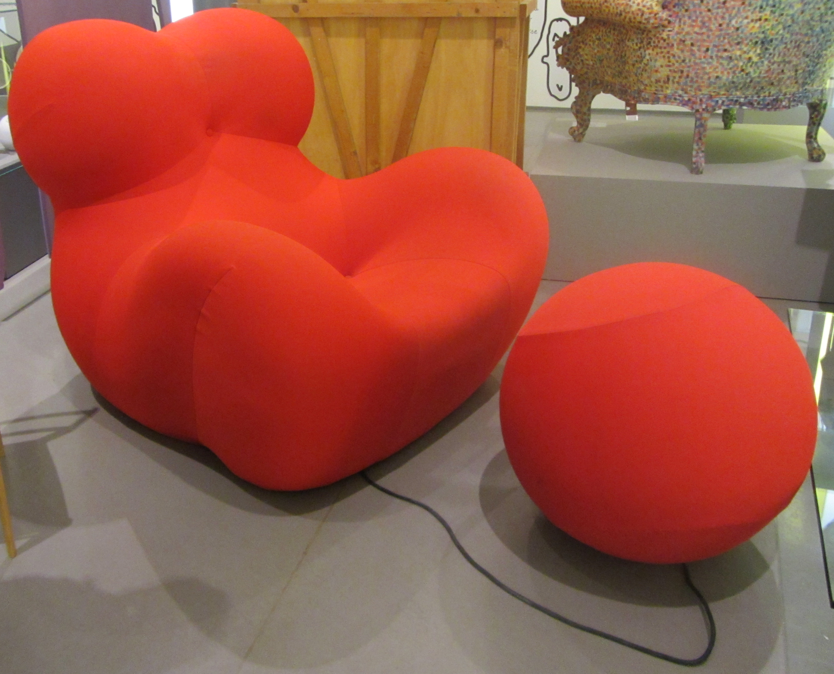 Le poltrone UP5 e UP6 al Triennale Design Museum di Milano durante la mostra "le fabbriche dei sogni" Serie UP di Gaetano Pesce B&B ITALIA 1969 + riedizione 2000